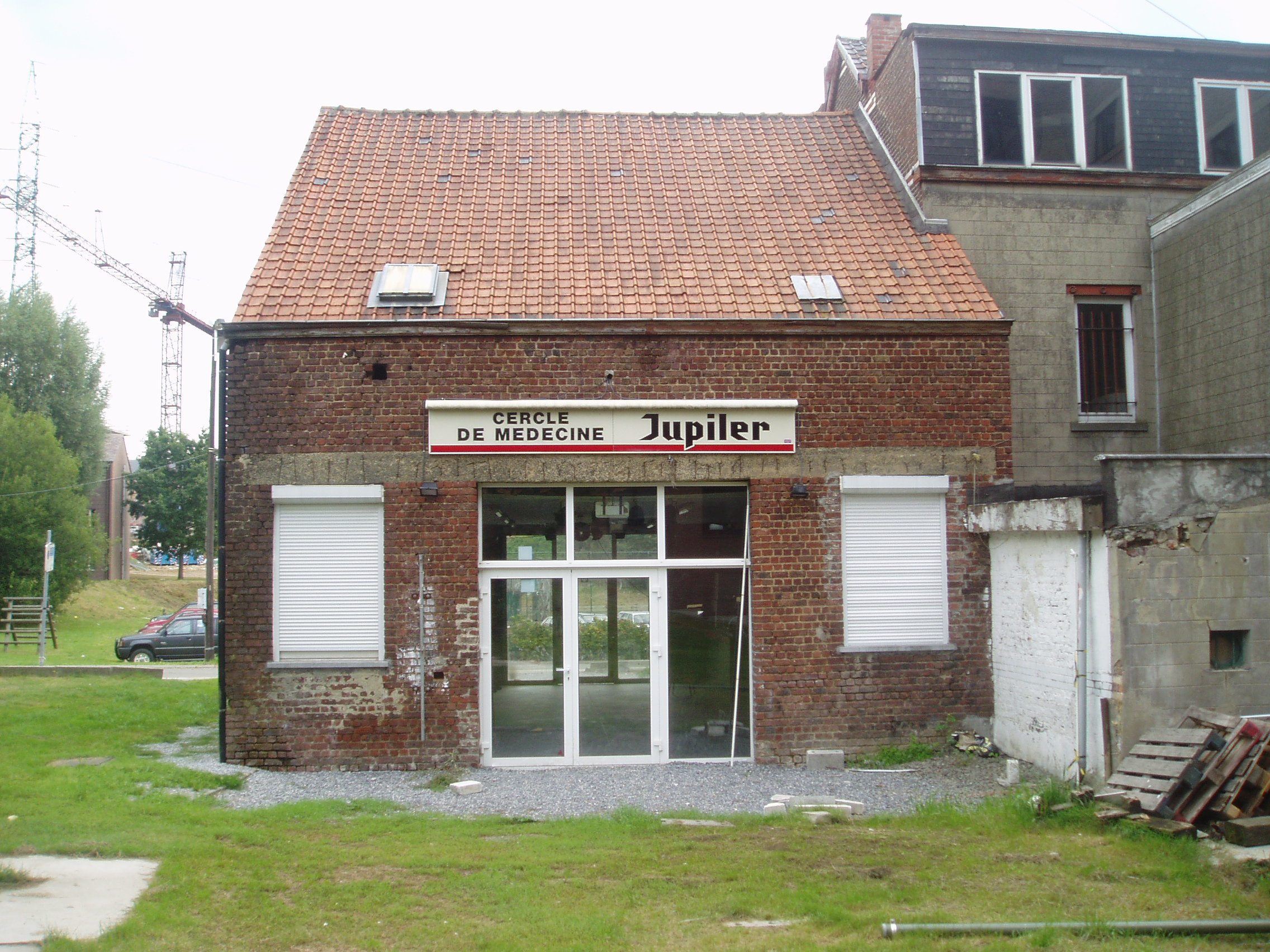 Local du Cercle de médecine de l'ULB au 6 rue Meylenmeersch sur le campus Erasme.Détruit en février 2008.